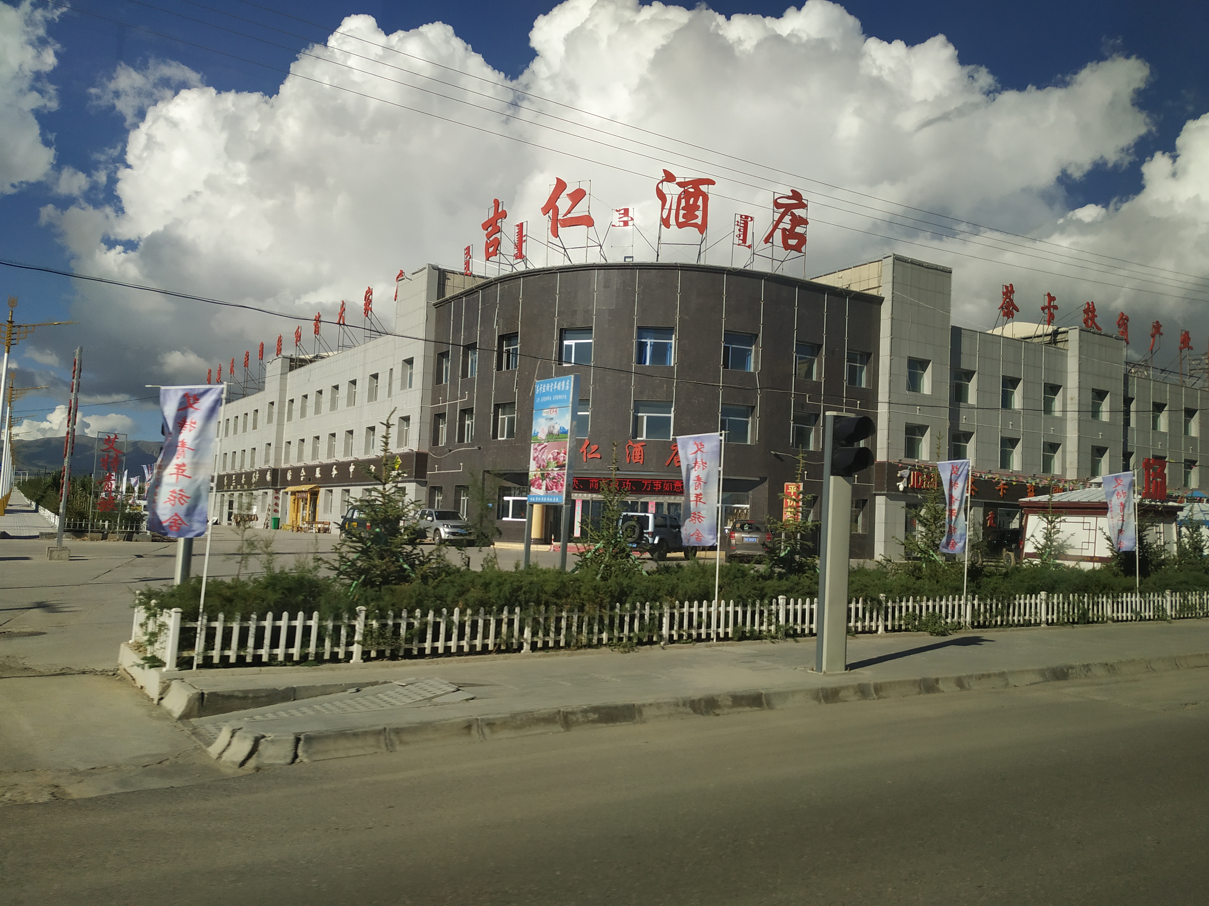 中文（中国大陆）: 海西乌兰县茶卡镇